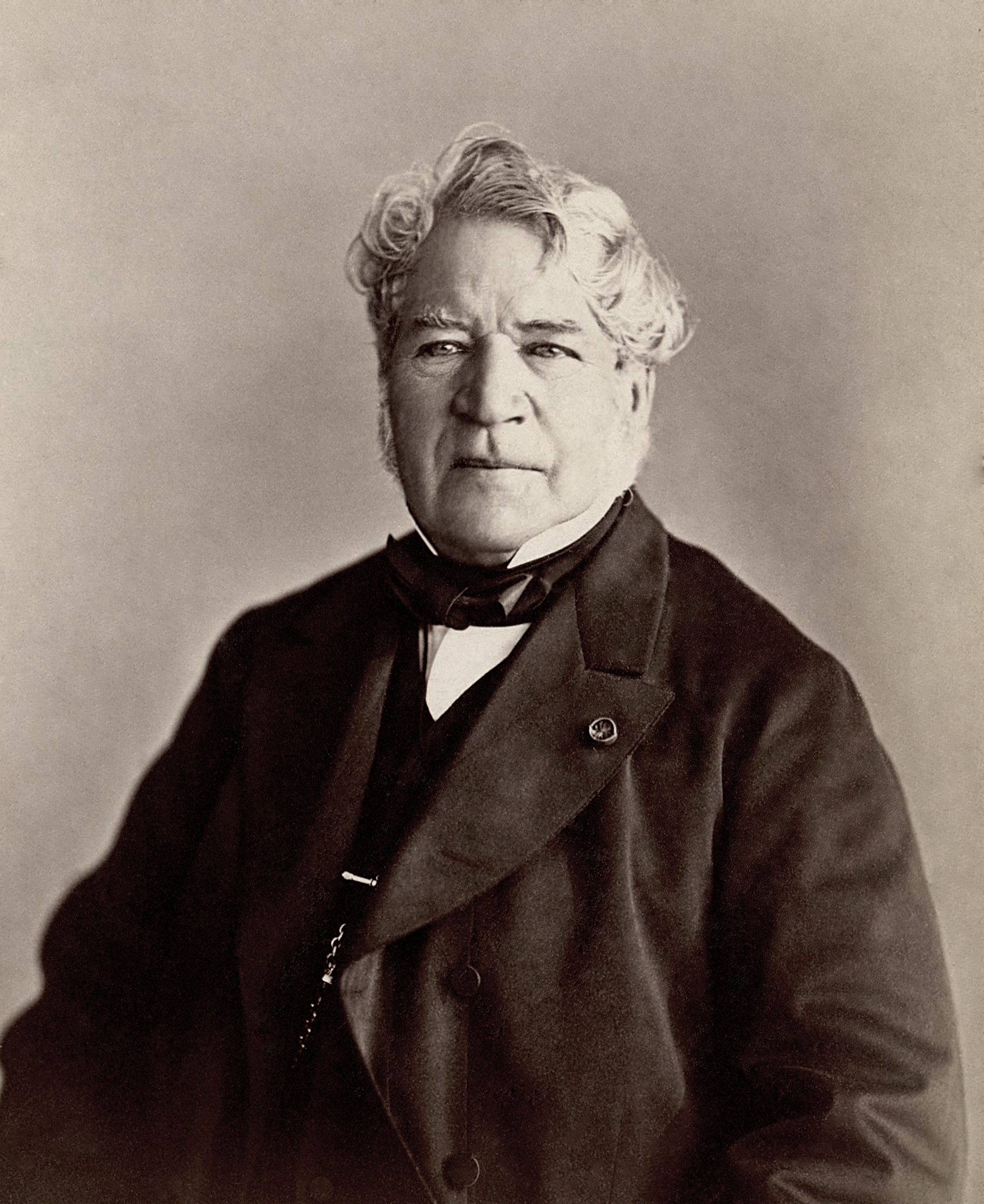 Eugène Isabey (1803 - 1886), peintre français.